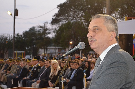 Hugo Passalacqua, gobernador de la Provincia de Misiones (electo el 25 de octubre de 2015), en el marco de la ceremonia protocolar por el Aniversario de los 159 años de la creación de la institución. Centenares de efectivos y familiares participaron del acto desarrollado en el campo de deportes de la Escuela de Policía “Manuel Belgrano”.